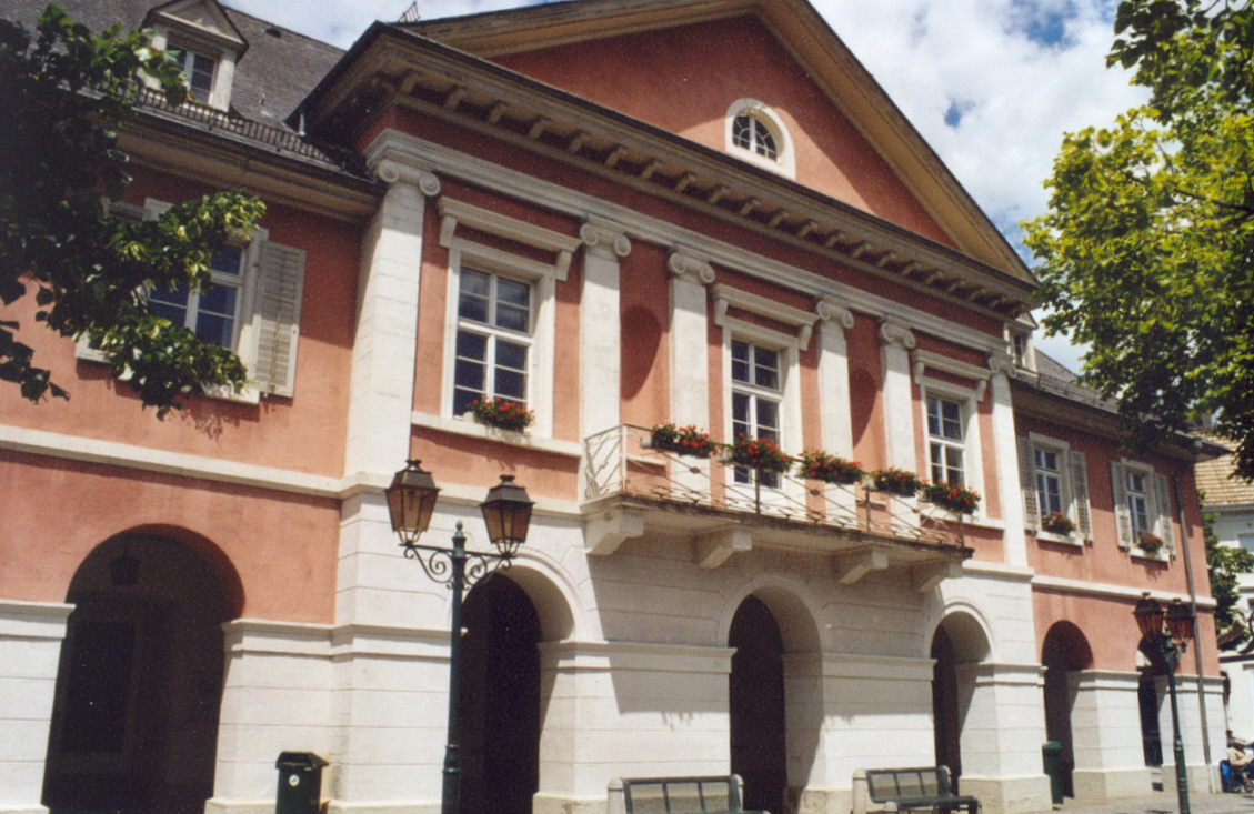 Das Schopfheimer Rathaus im Weinbrenner-Stil (Vorderseite), erbaut 1826.